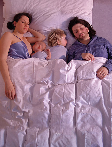 Fotografie Barbory Bálkové; Barbora Bálková´s photographs